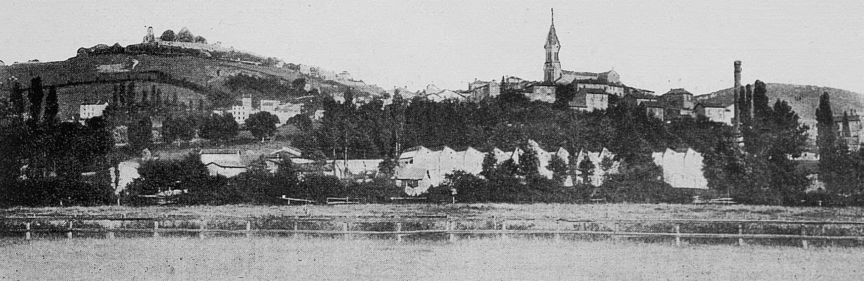 Dictionnaire illustré des communes du département du Rhône. Tome 1 / par MM. E. de Rolland et D. Clouzet.